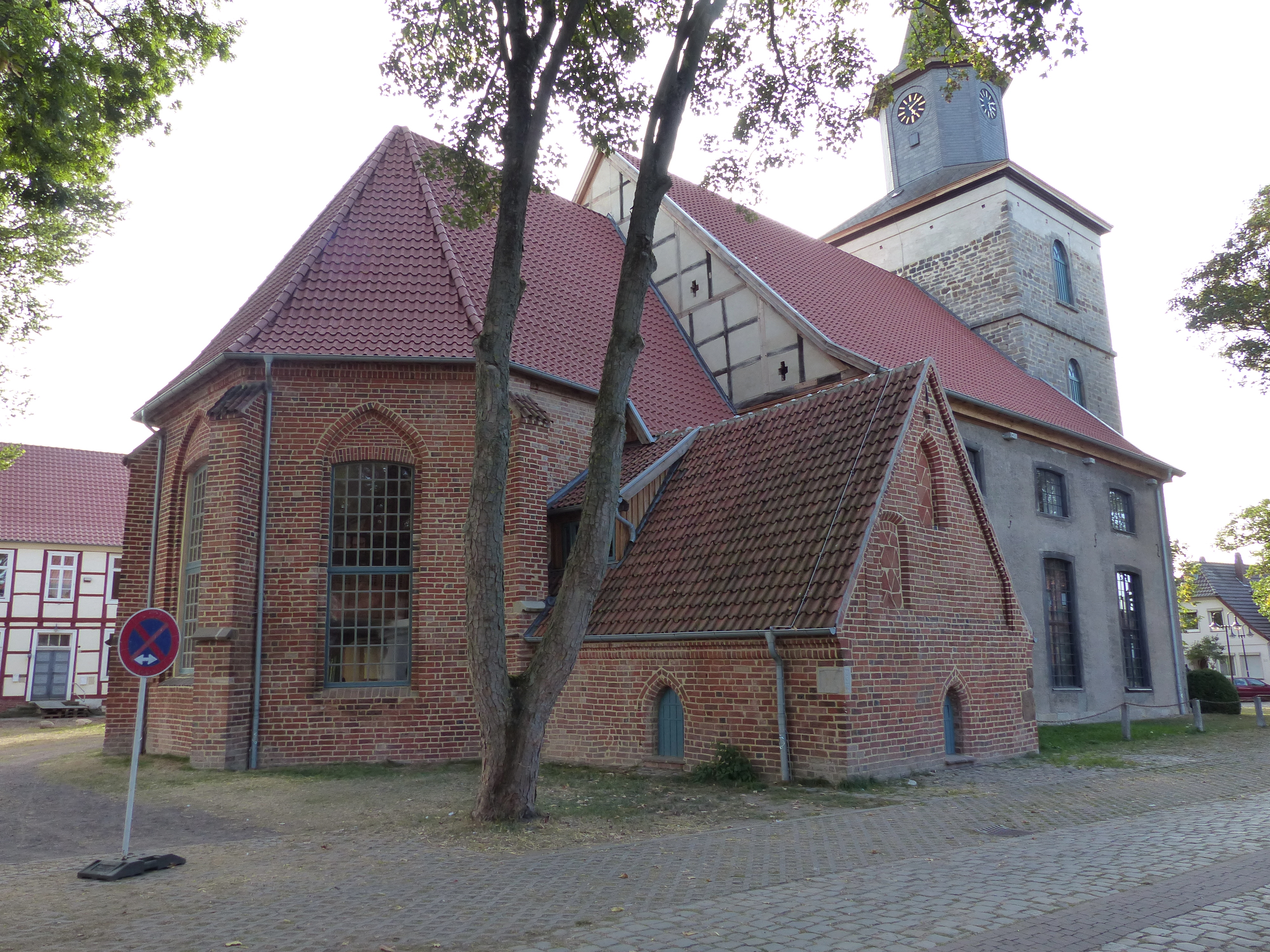 Martinskirche (heute Kulturzentrum) in Hoya an der Weser